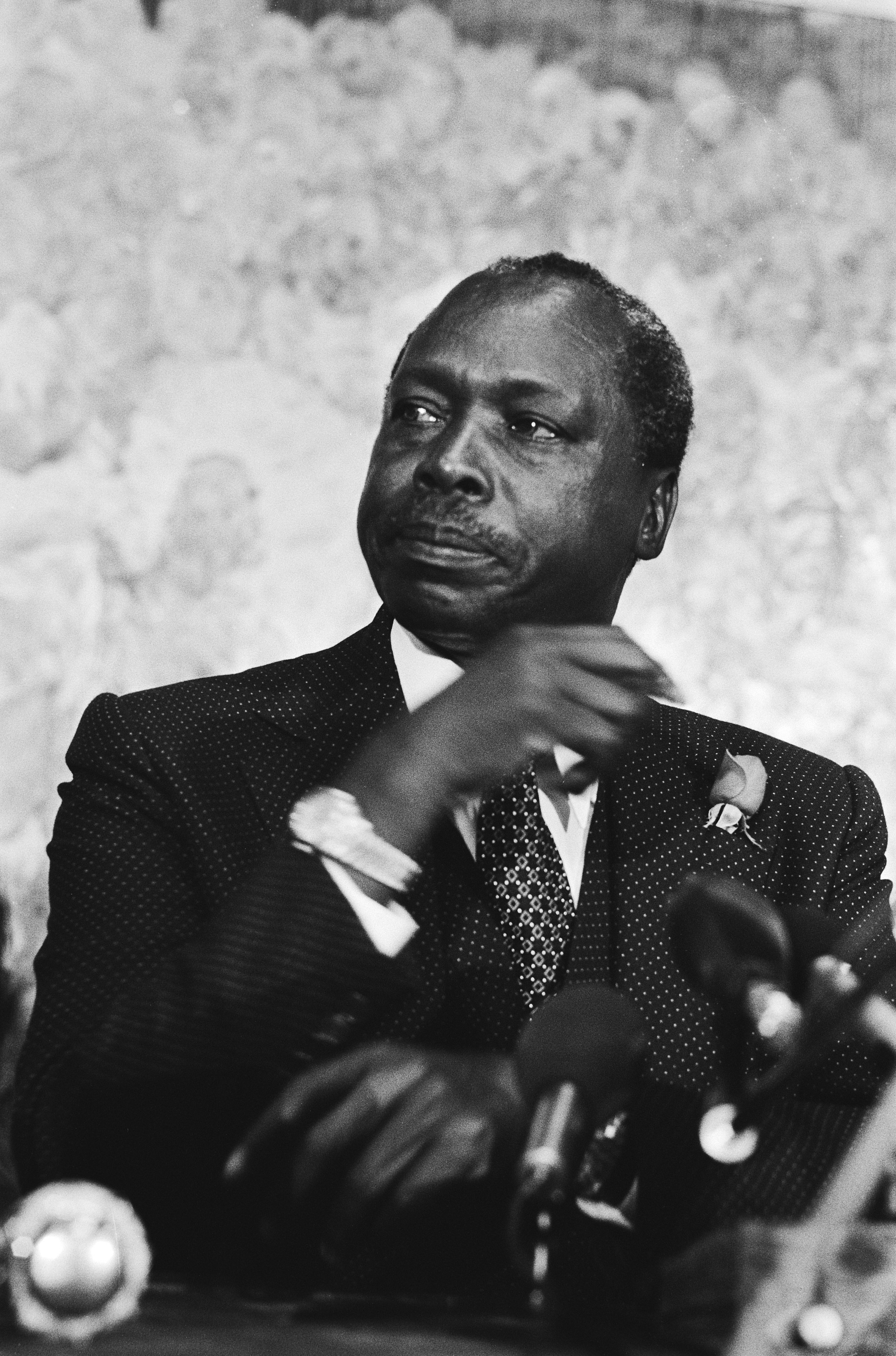 Collectie / Archief : Fotocollectie Anefo Reportage / Serie : Persconferentie Kenyase president Daniel arap Moi in Den Haag Datum : 21 juni 1979 Locatie : Den Haag, Zuid-Holland Trefwoorden : persconferenties, portretten, presidenten Persoonsnaam : Moi, Daniel Arap Fotograaf : Croes, Rob C. / Anefo Auteursrechthebbende : Nationaal Archief Materiaalsoort : Negatief (zwart/wit) Nummer archiefinventaris : bekijk toegang 2.24.01.05 Bestanddeelnummer : 930-3253